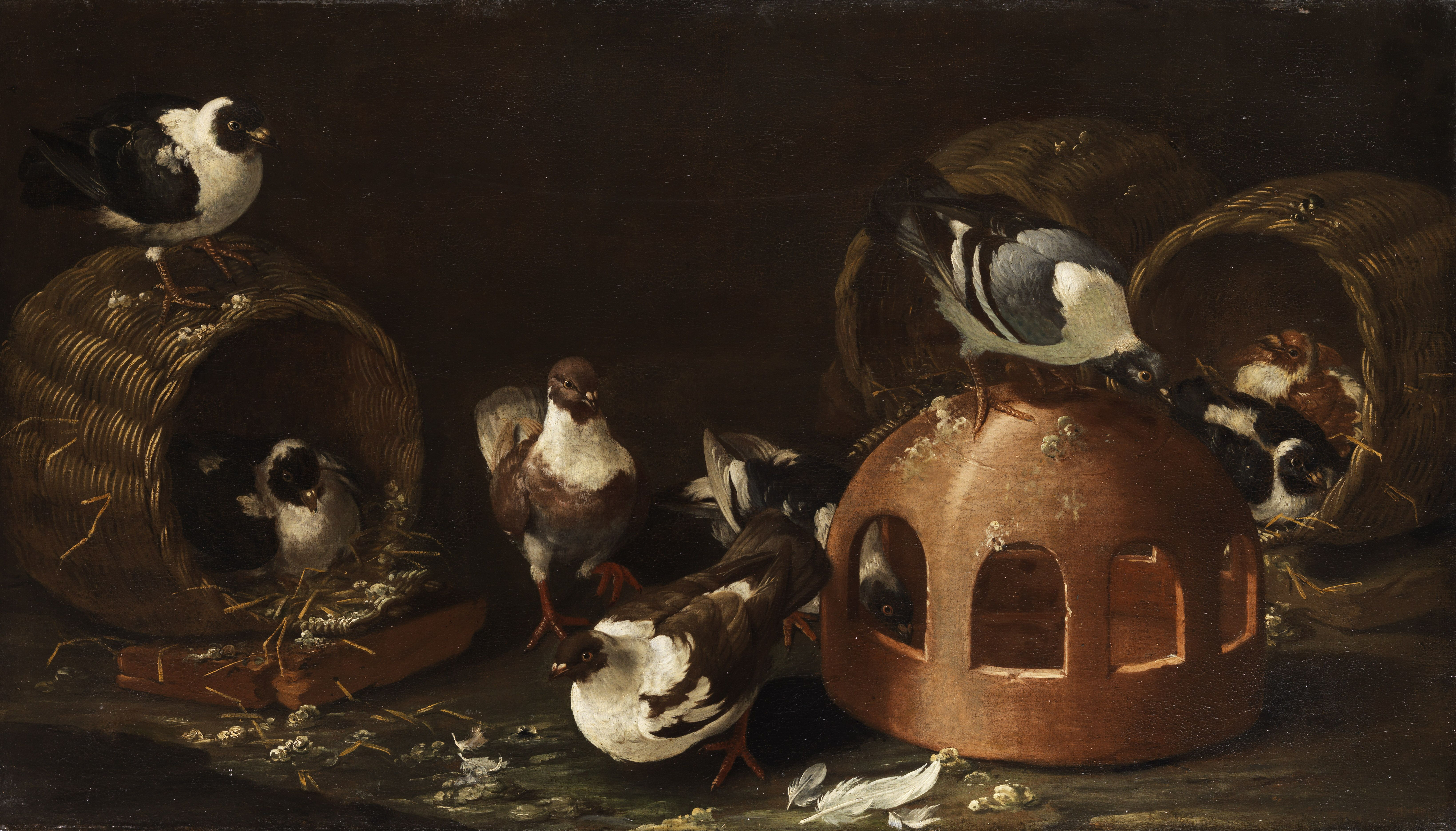 Tauben zwischen Futtertrog und Körben.